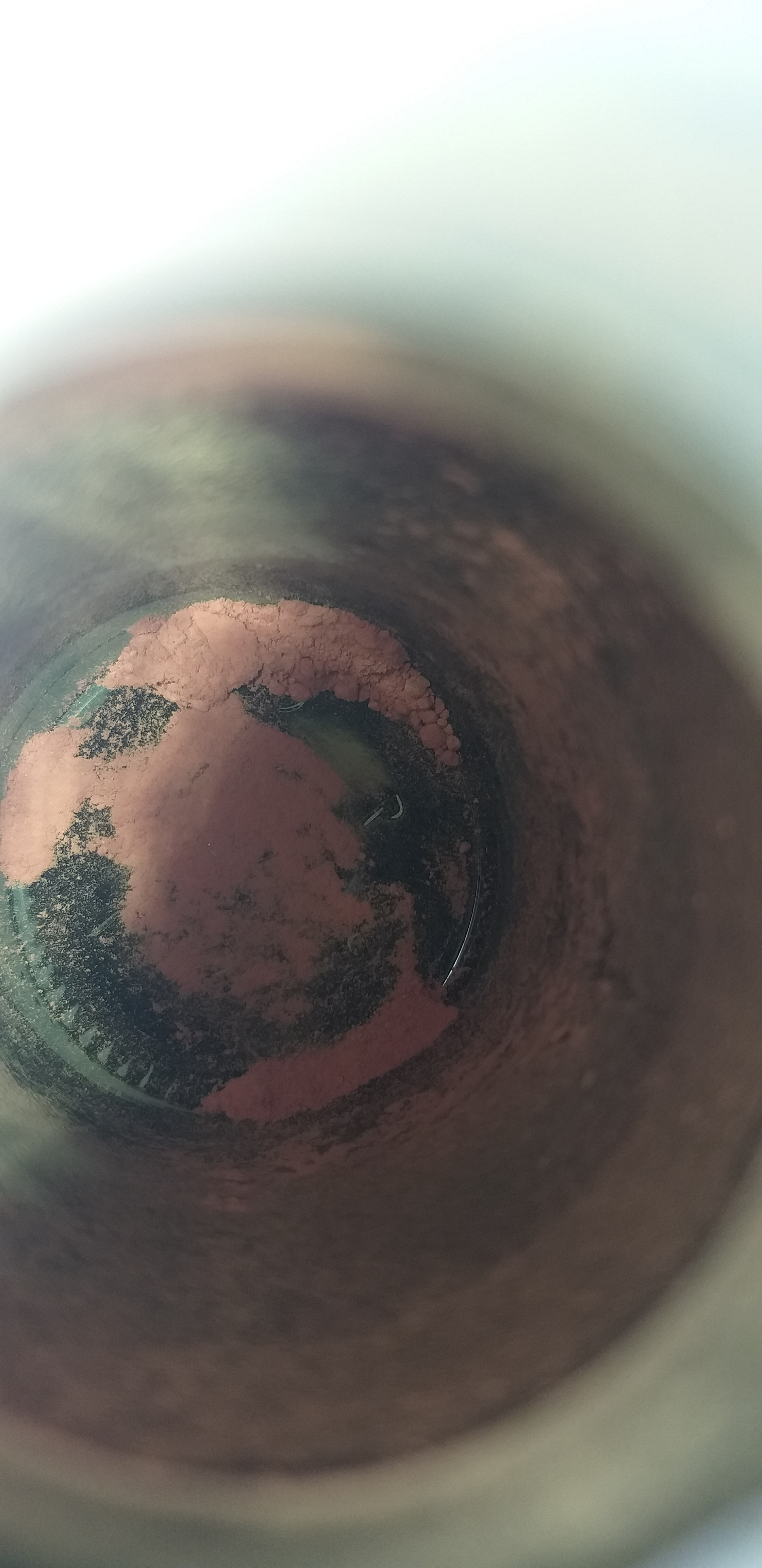 Natriumhexanitrocobaltat III Rest